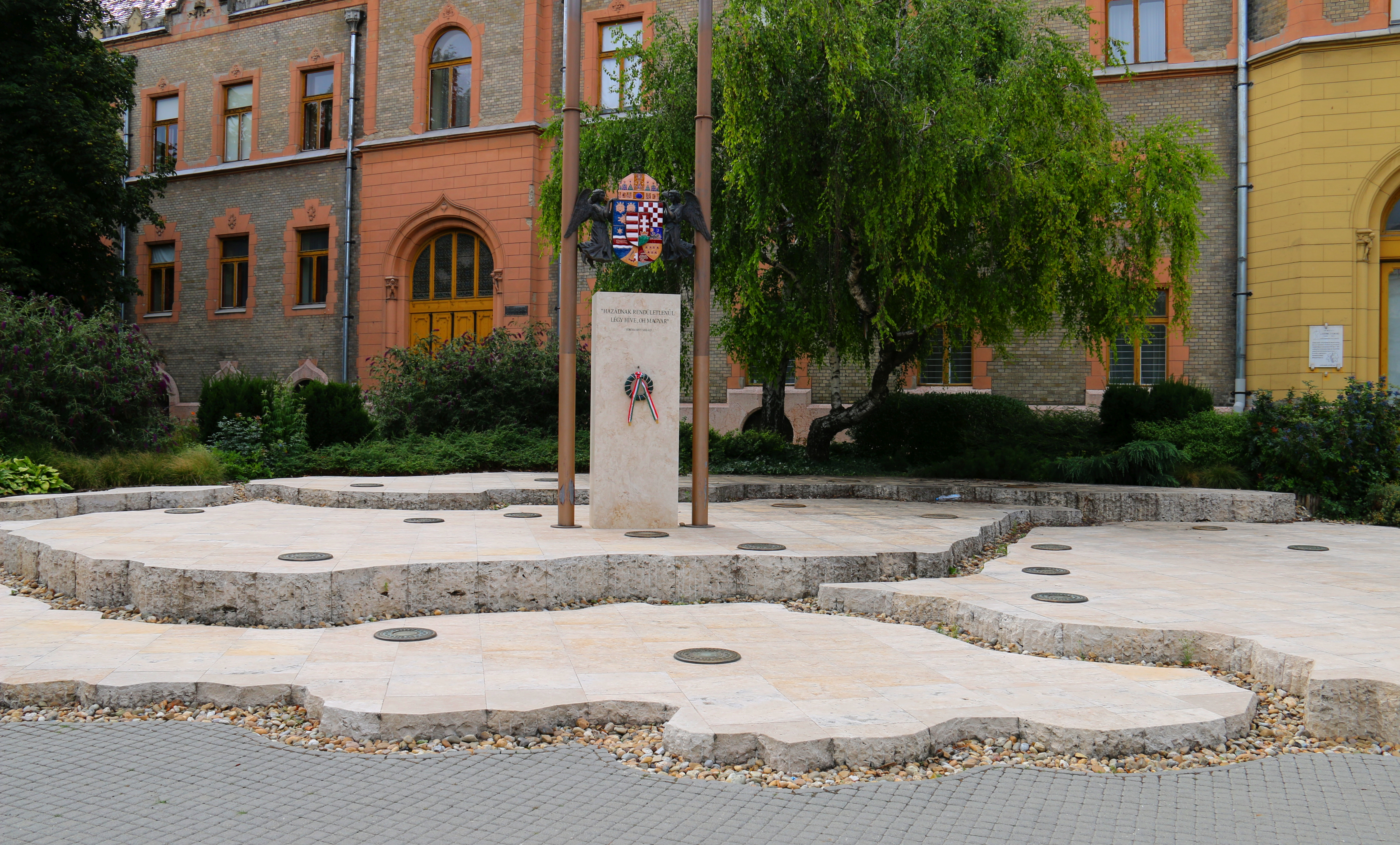 Trianon-emlékmű a szétszabdalt Nagy-Magyarországgal és az angyalos címerrel a kecskeméti Városháza mellett. Országzászló (Ha hiv. név) készitette:Babinszky Tünde (építész), Katkics Tamás (építész), Vásárhelyi Dániel (építész), Balanyi Zoltán, Balanyi Károly. Absztrakt, Bronz, Mészkő, Zománc, Városképi jelentőségű, 2010-ben avatták. [1]- Kecskemét, Lestár tér 1. a Városháza és a Színház között